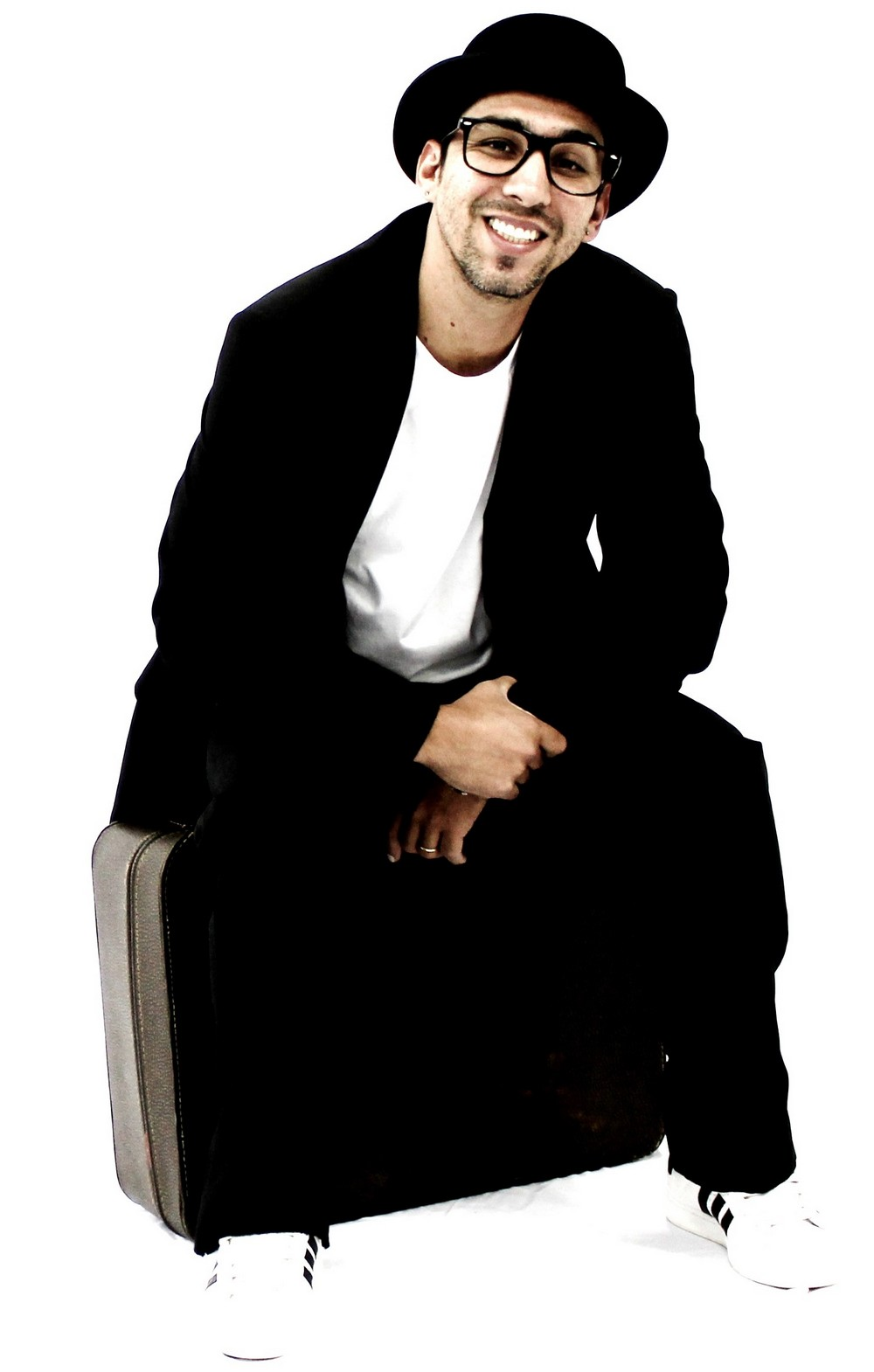 Márcio Pial em book artístico para divulgação de shows